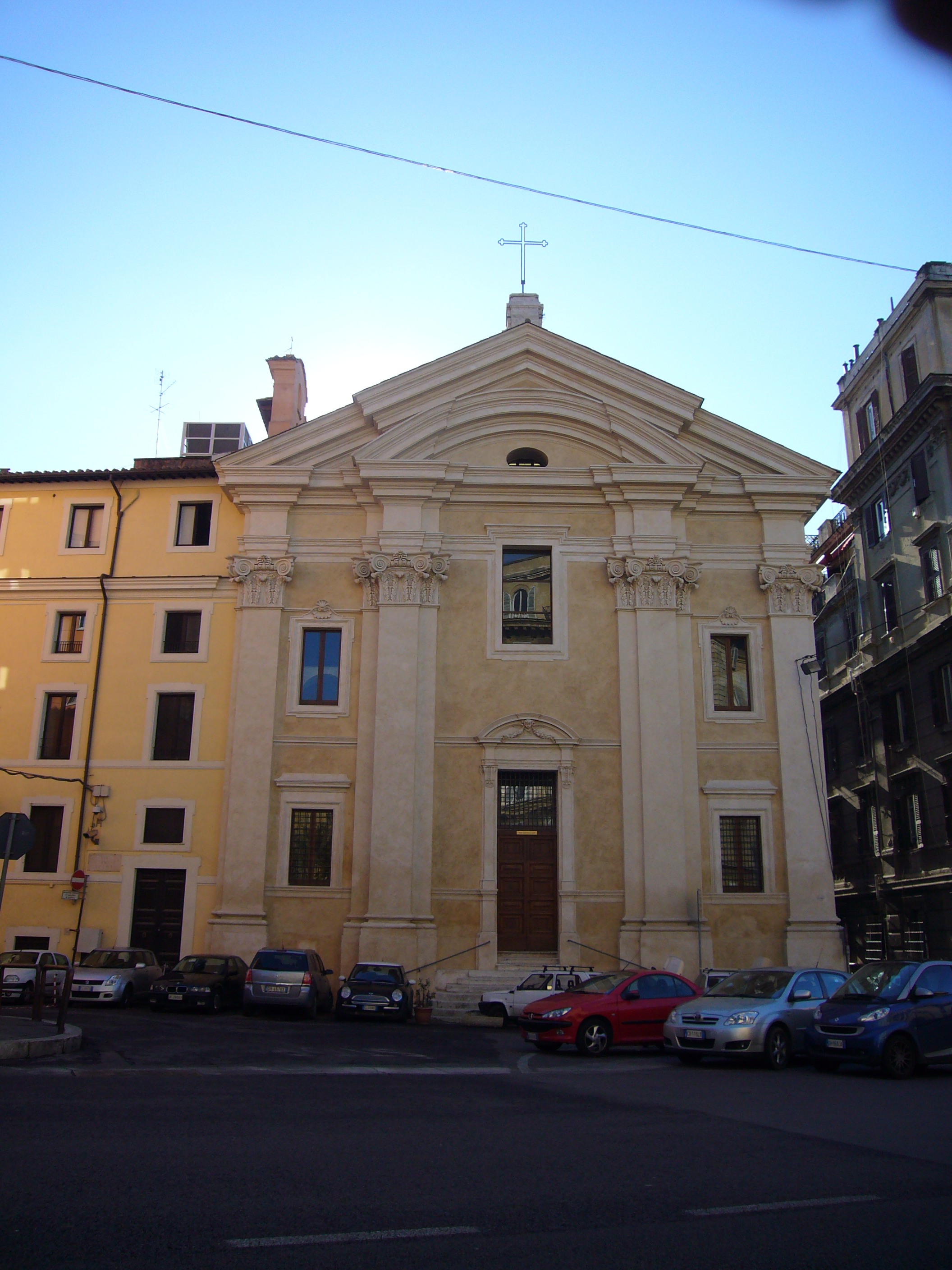 Roma, chiesa dei santi Gioacchino e Anna ai Monti